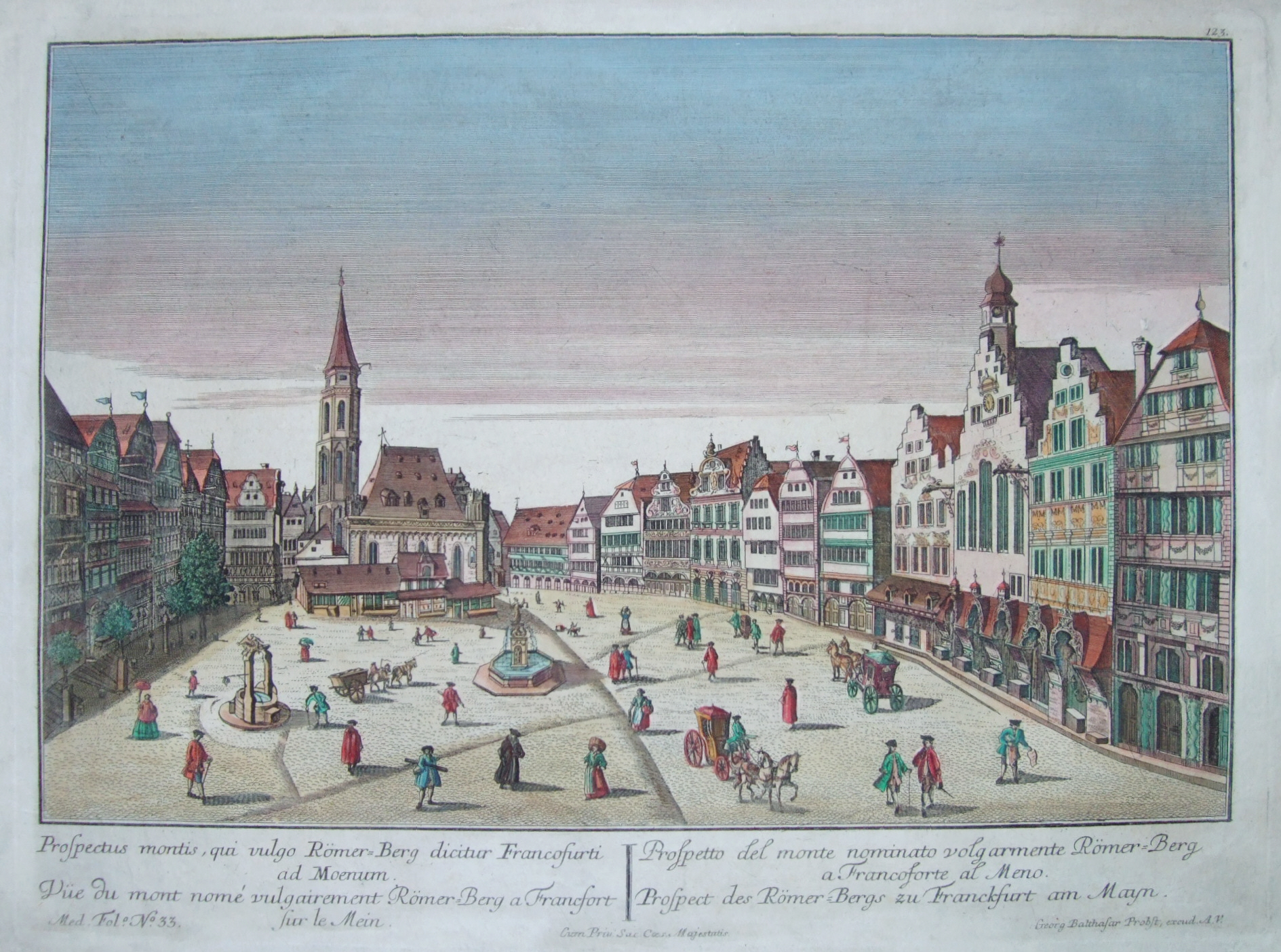 Frankfurt am Main, Guckkastenbild des Römerbergs („Prospect des Römer-Bergs zu Franckfurt am Mayn“), Motivmaß 41 cm x 26,9 cm